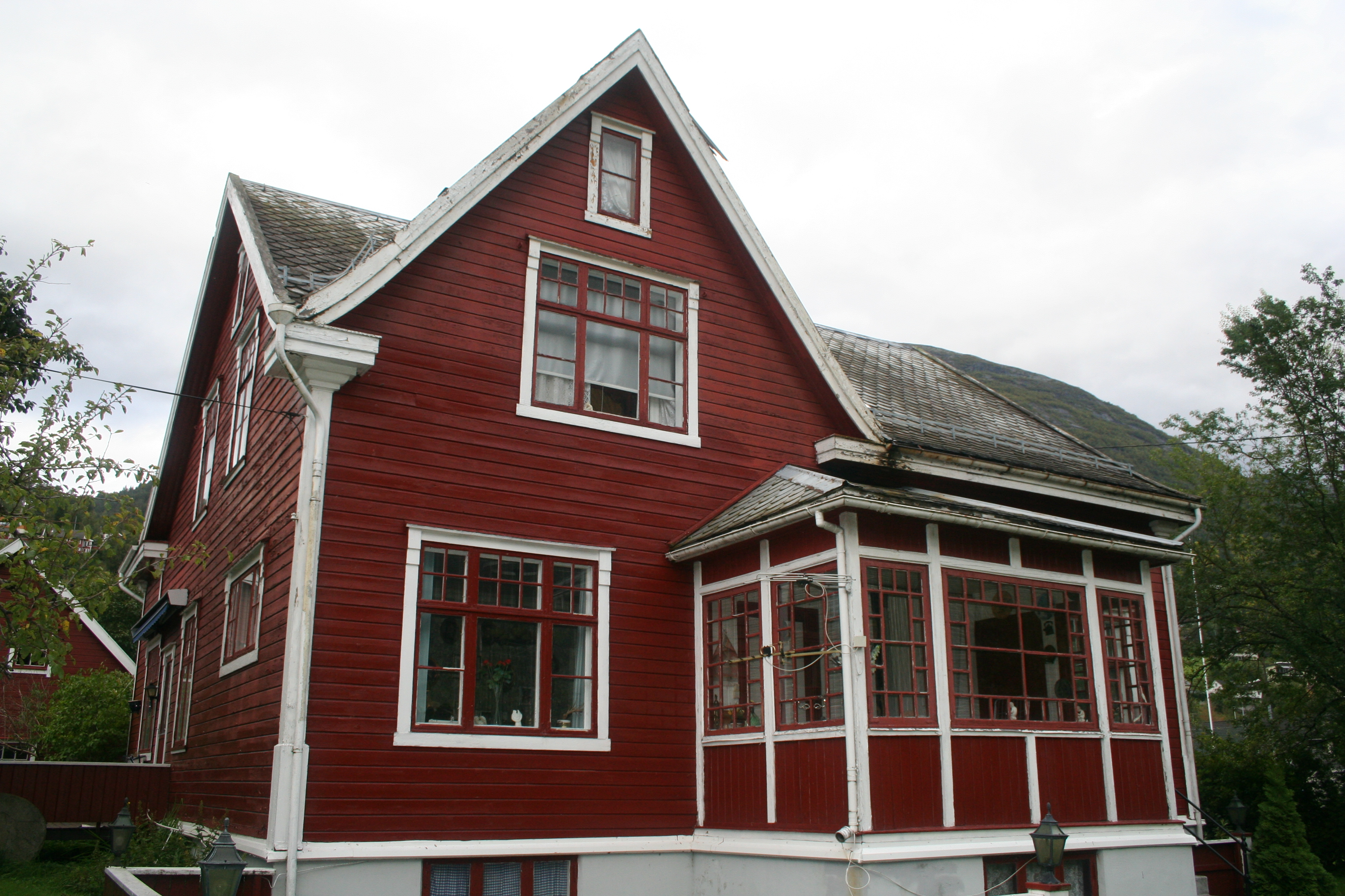 Lensmannsgården Tingvoll i Stryn, tegnet av arkitekt Jon Os. Oppført i 1932 og var lensmannsgård i Stryn frem til 1960. Bygningen med sidebygning og uthus, hage og forterreng ble fredet av Riksantikvaren i 2012